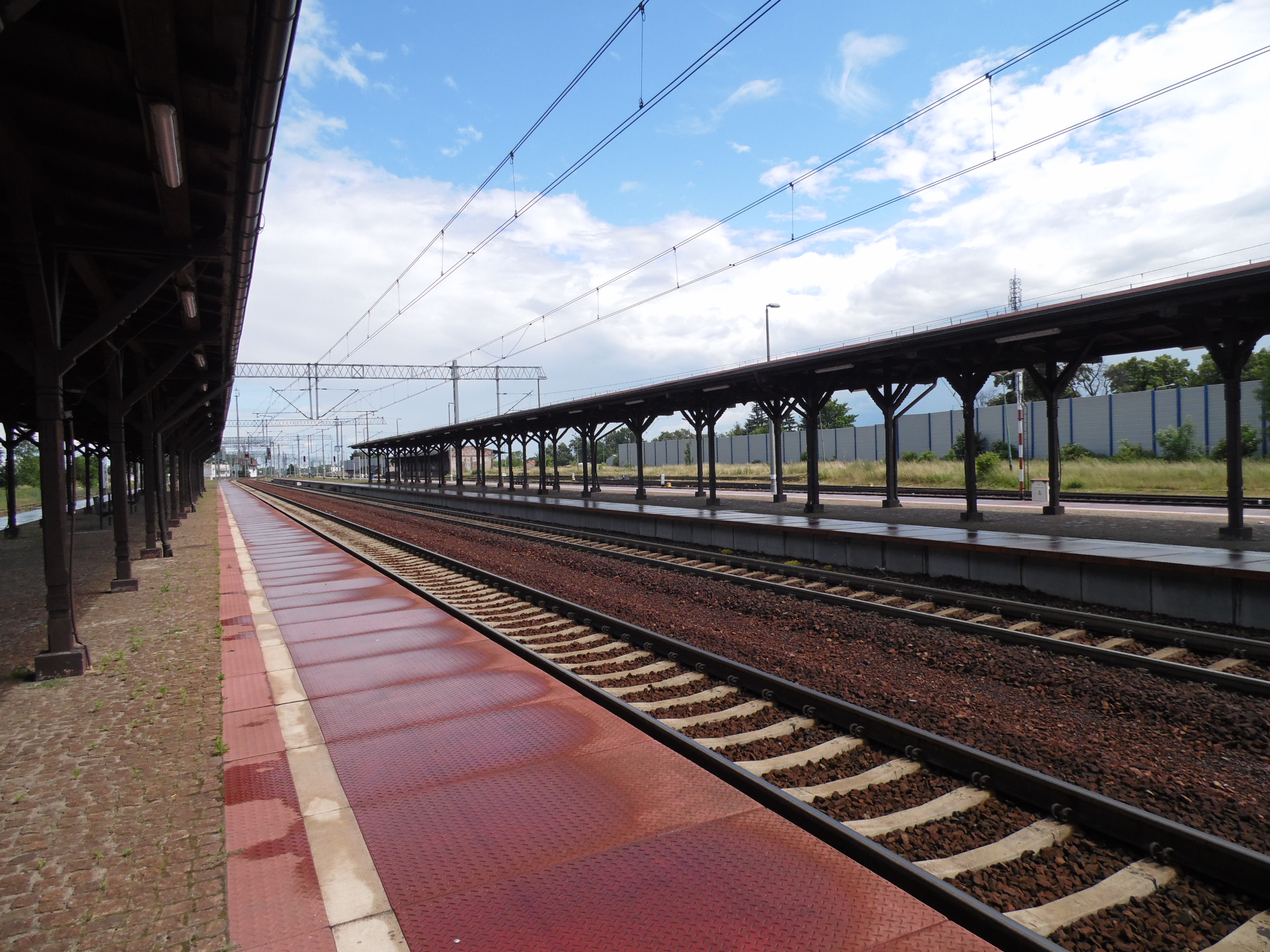 Stacja PKP.